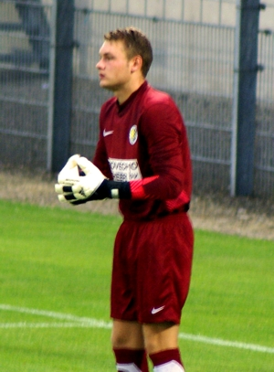 Jeroen Zoet (Veendam, 6 januari 1991) is een Nederlandse doelman, die onder contract staat bij PSV, maar momenteel is verhuurd aan RKC Waalwijk. Eredivisiedebuut Jeroen Zoet tijdens wedstrijd RKC Waalwijk - Heracles Almelo